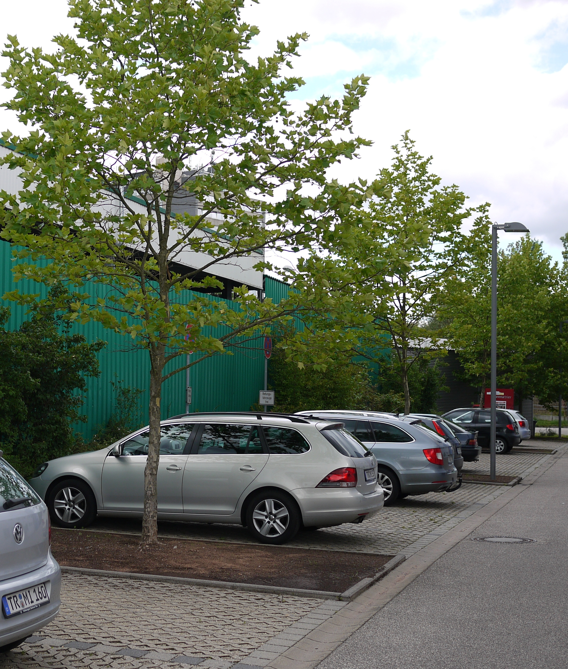 Экологическая парковка